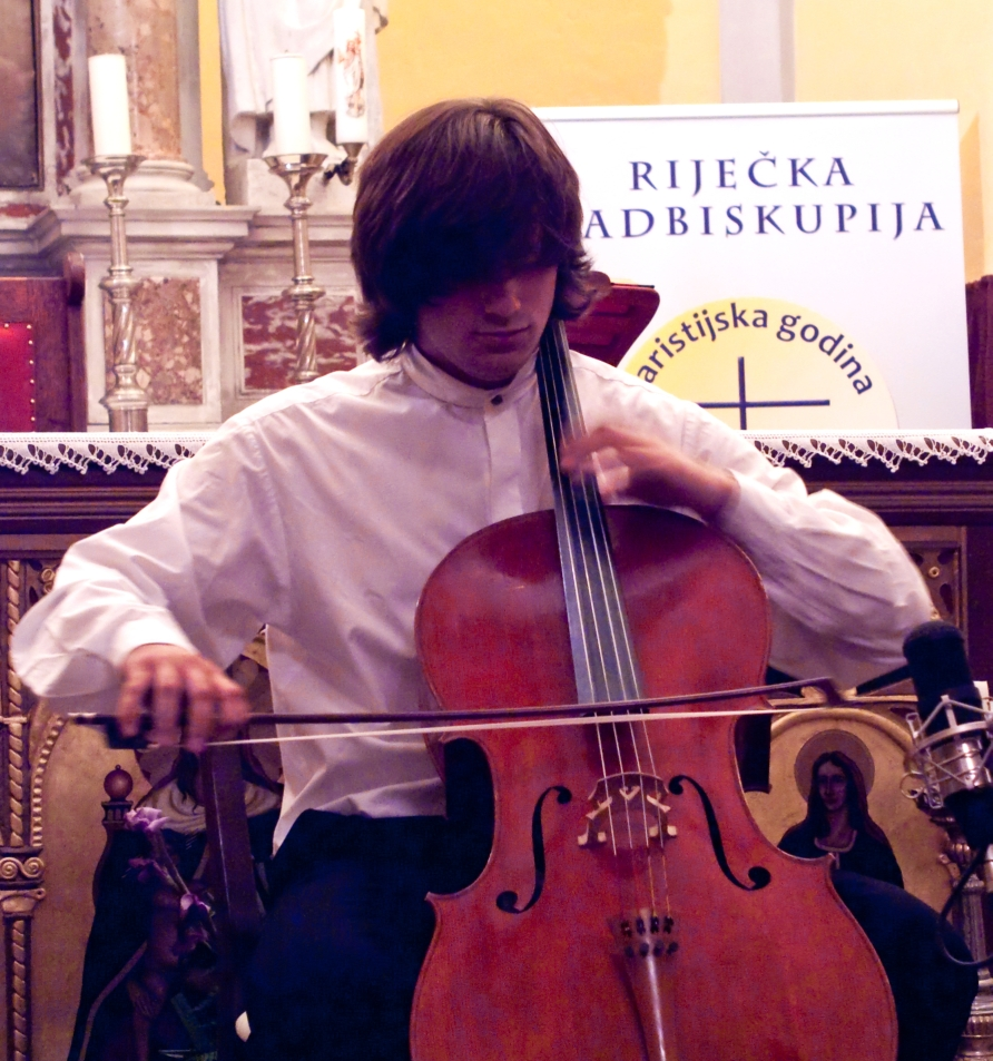 Stjepan Hauser